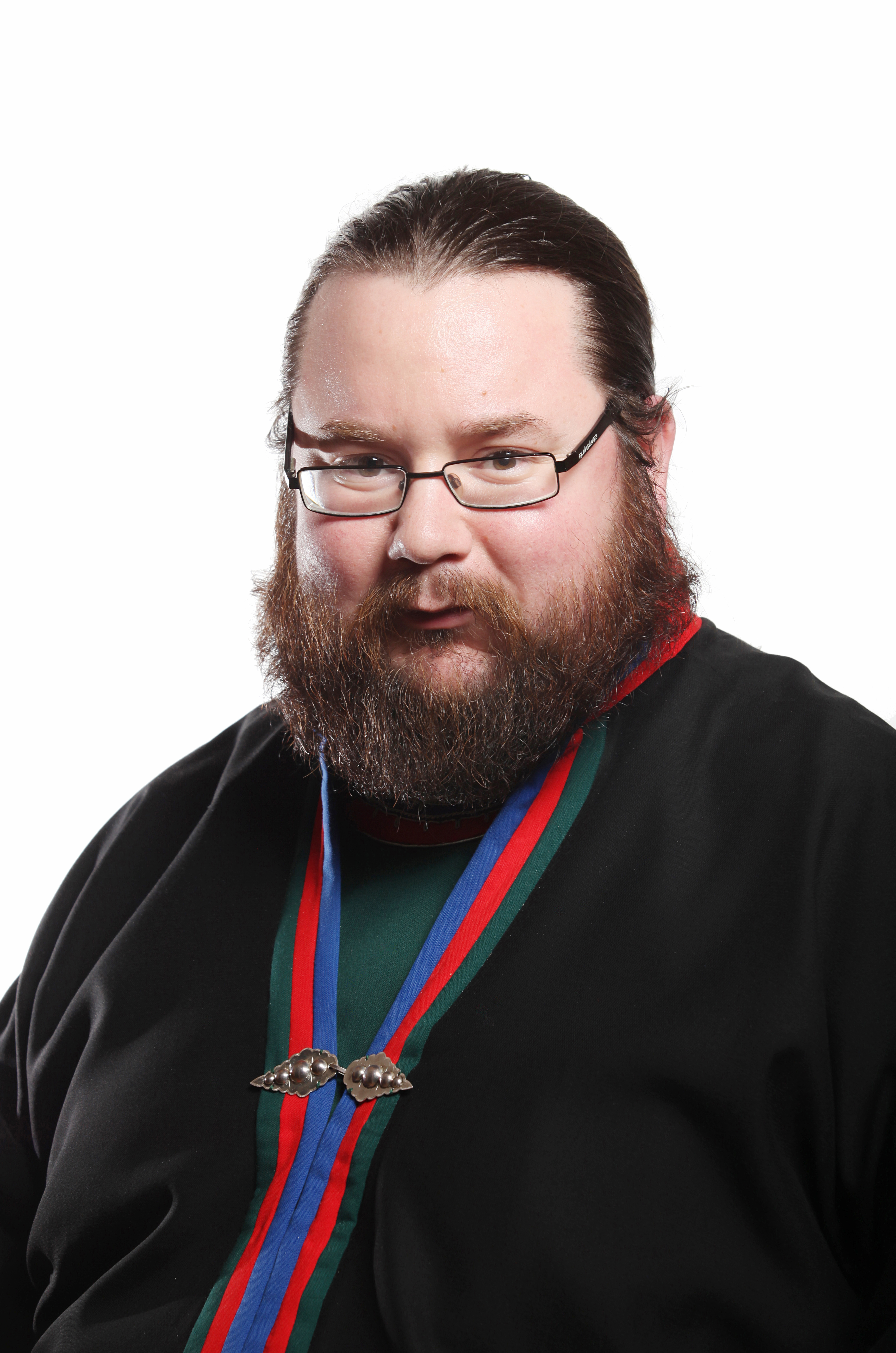 Medlem av plan- og finanskomitéen. Foto: Kenneth Hætta.